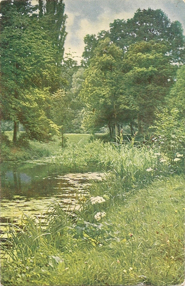 Salon de Paris. Vintage postcard